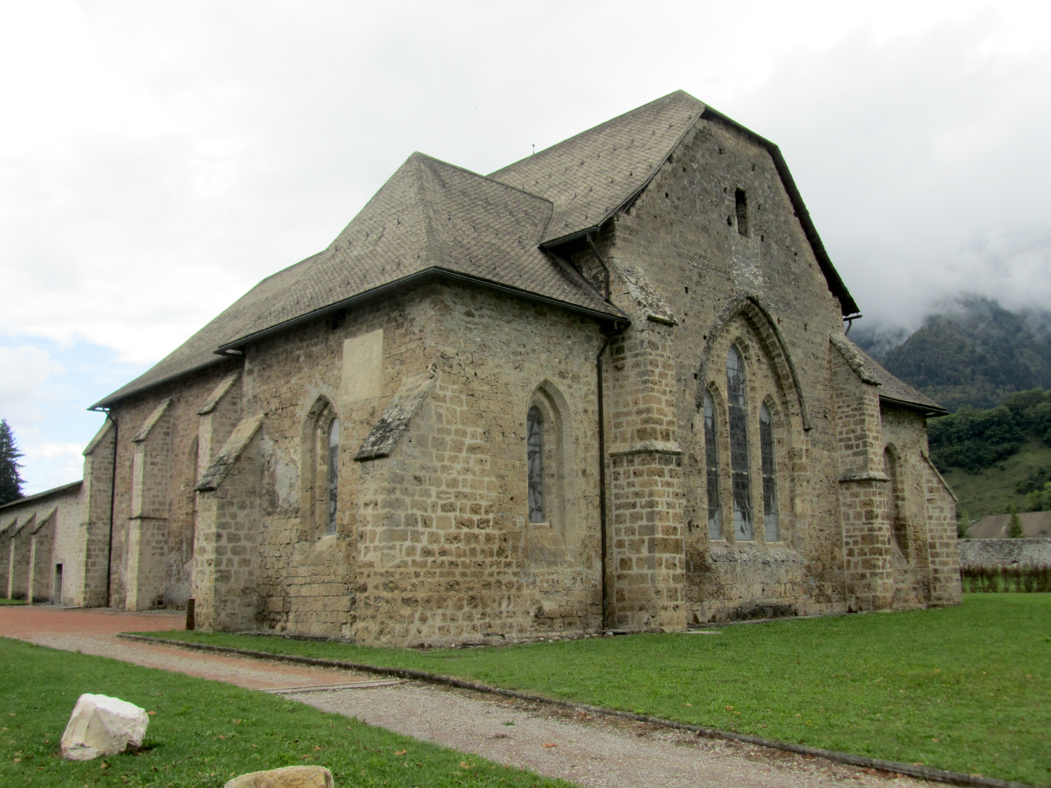 la Chartreuse de Mélan, une abbaye de Taninges